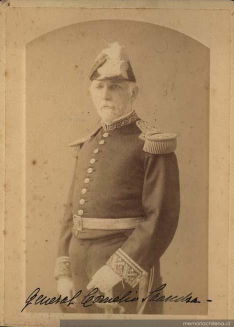 General chileno Cornelio Saavedra, 1821-1891